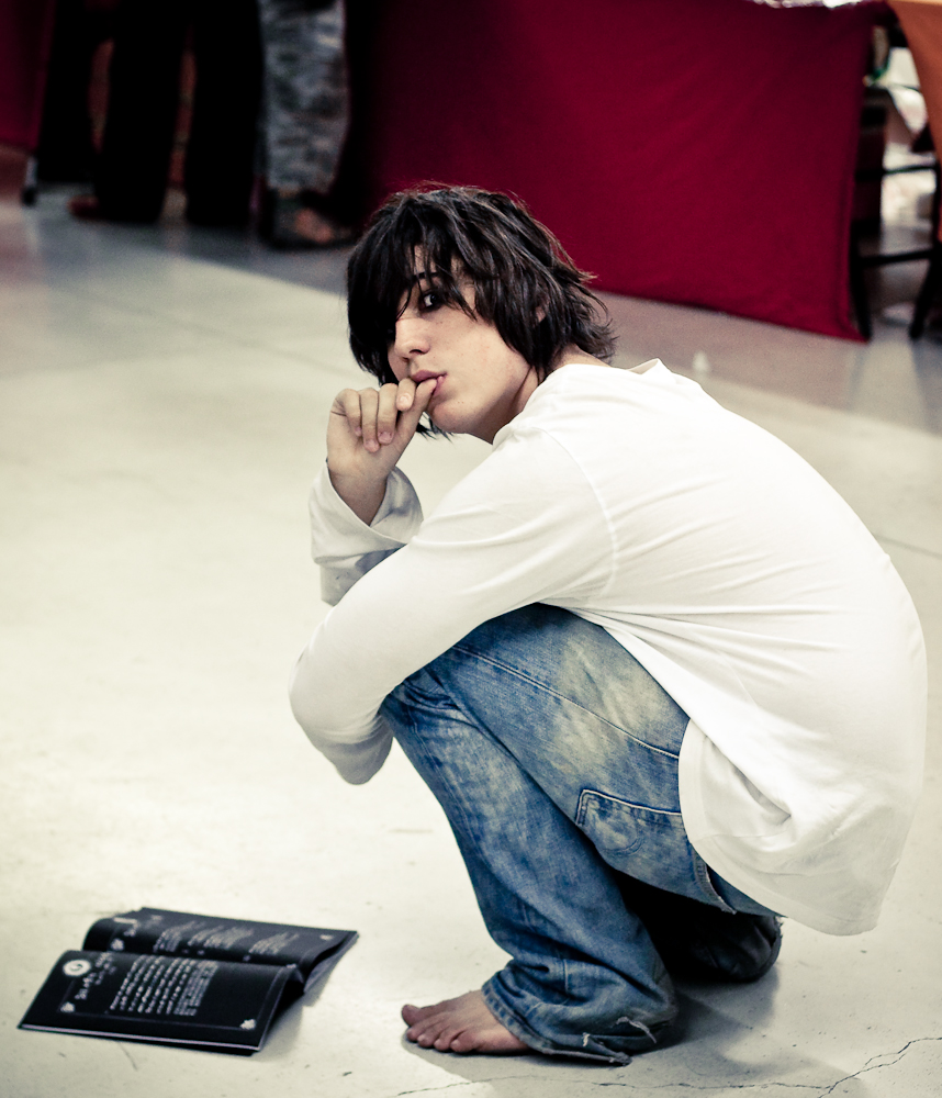 Paris Manga 8, September 2009, Parc des expositions de la porte de Versailles.